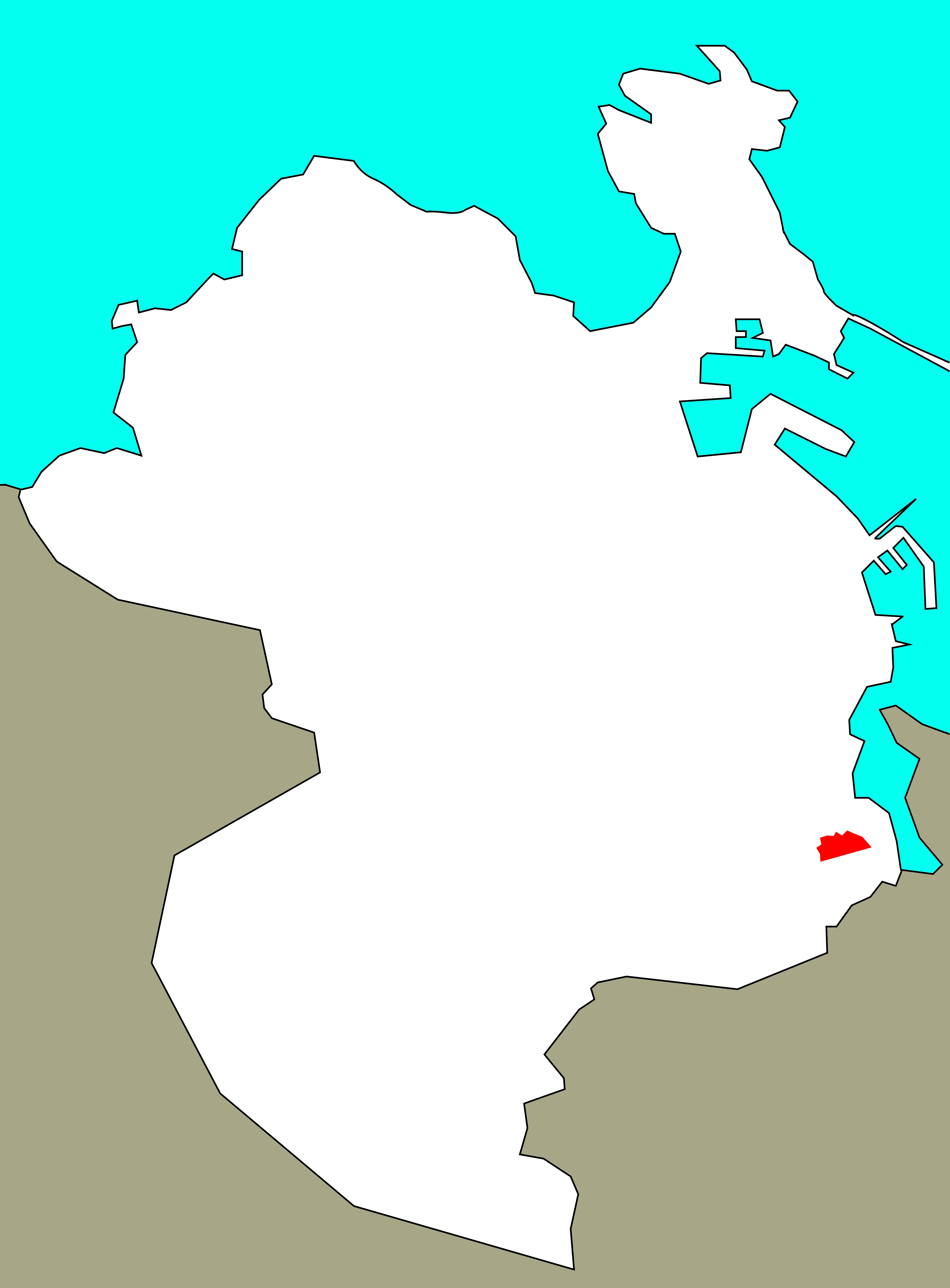 Situación de Pedro Fernández no concello da Coruña, segundo